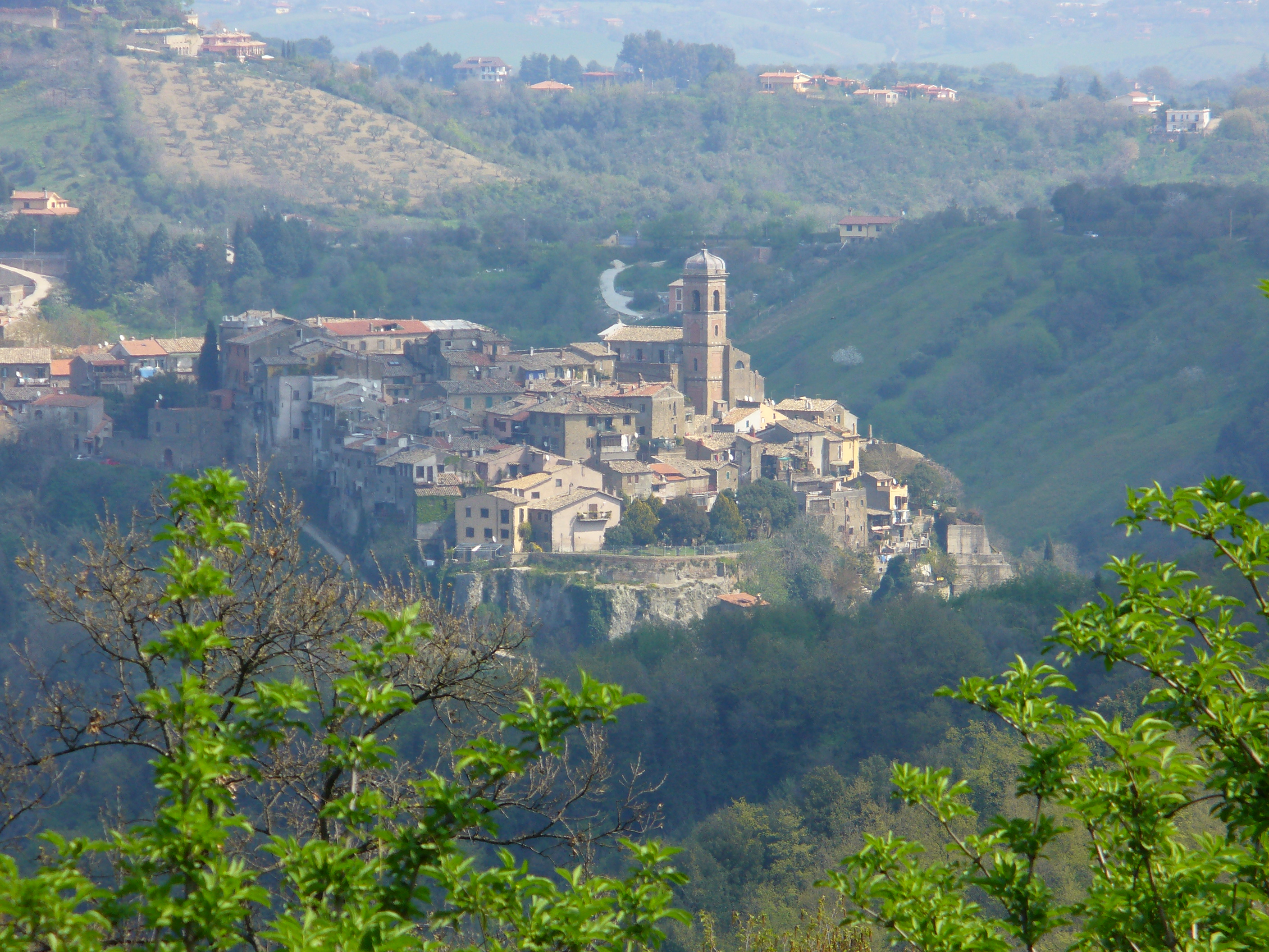 Morlupo (RM) - Vista dalla Flaminia